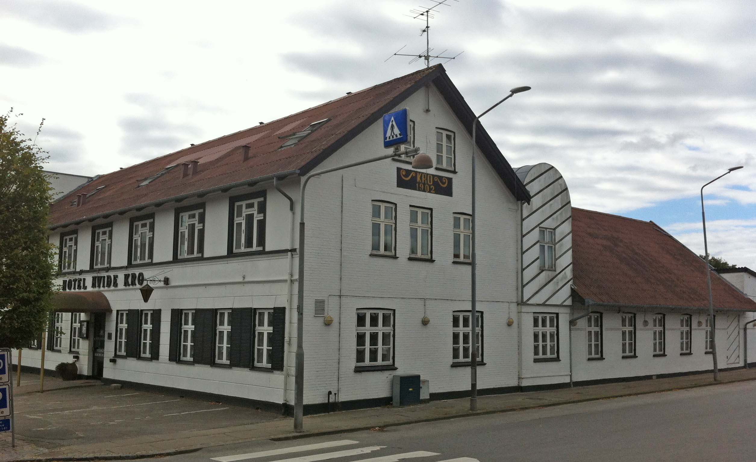 Hotel Hvide Kro i Aalestrup